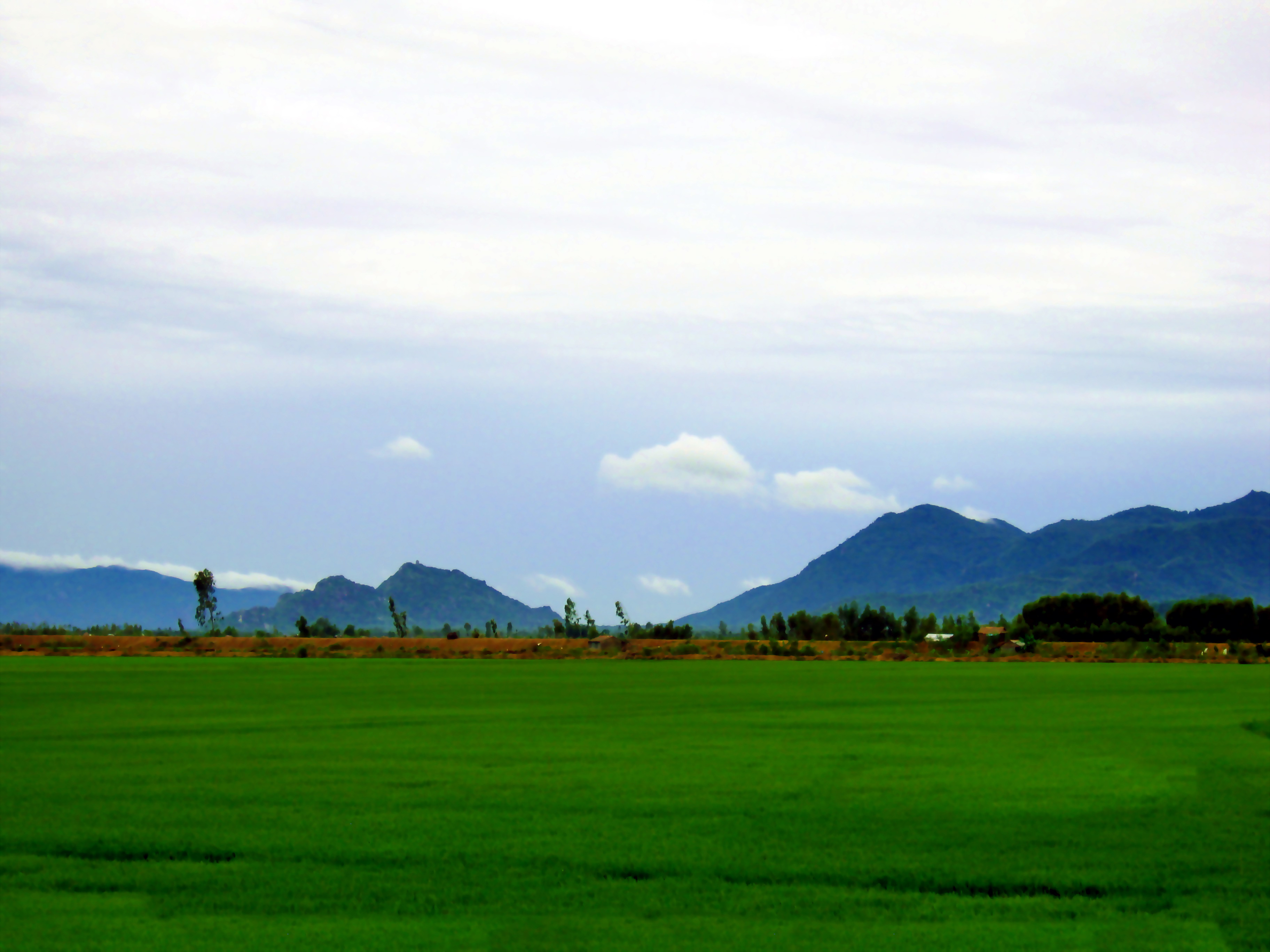 Một cánh đồng ở Ô Long Vỹ thuộc huyện Châu Phú, tỉnh An Giang, Việt Nam.